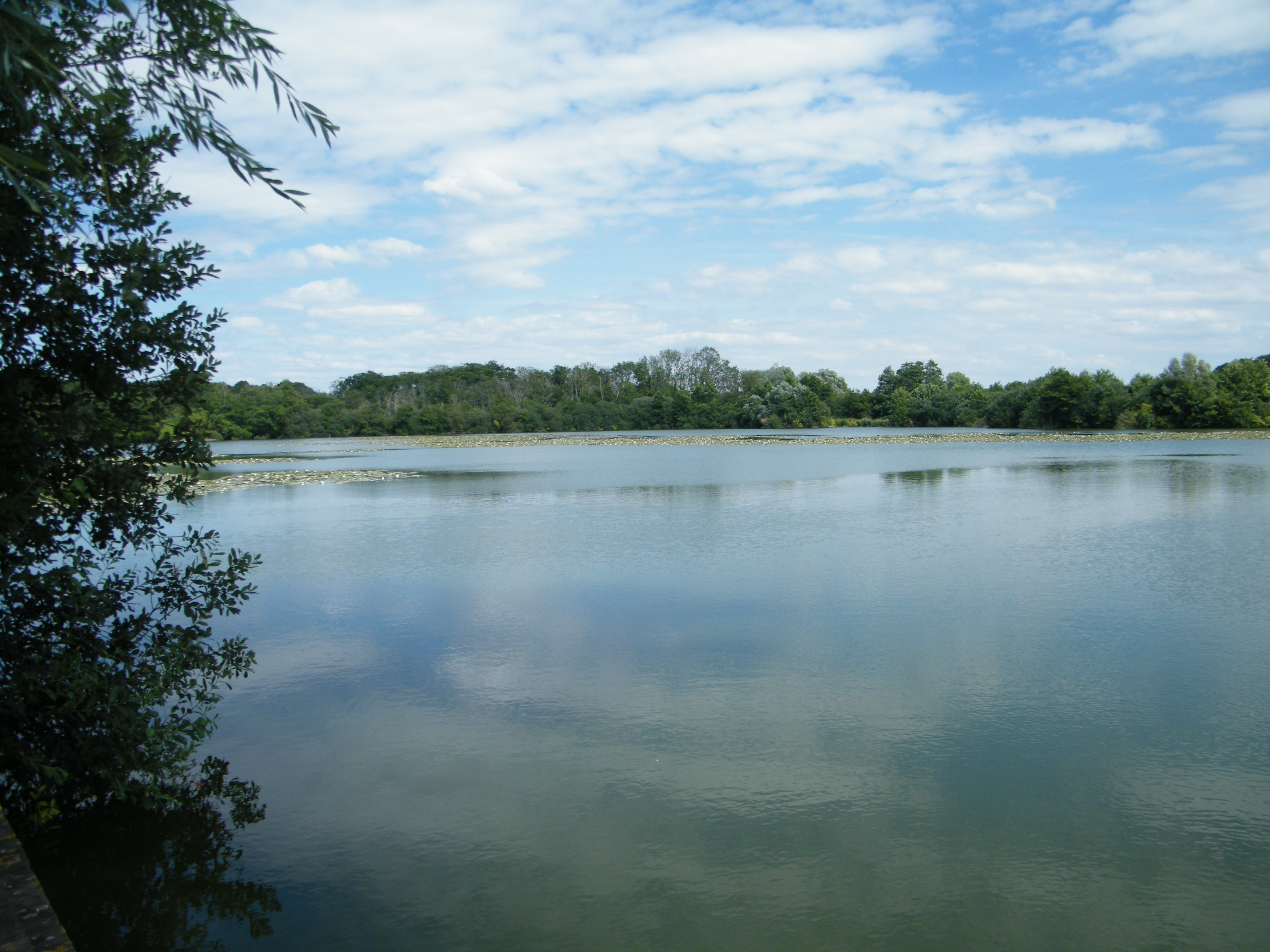 Arry (Somme) Vallée de la Maye, étangs dans le marais.